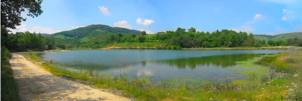 Jezero_na_Manjači